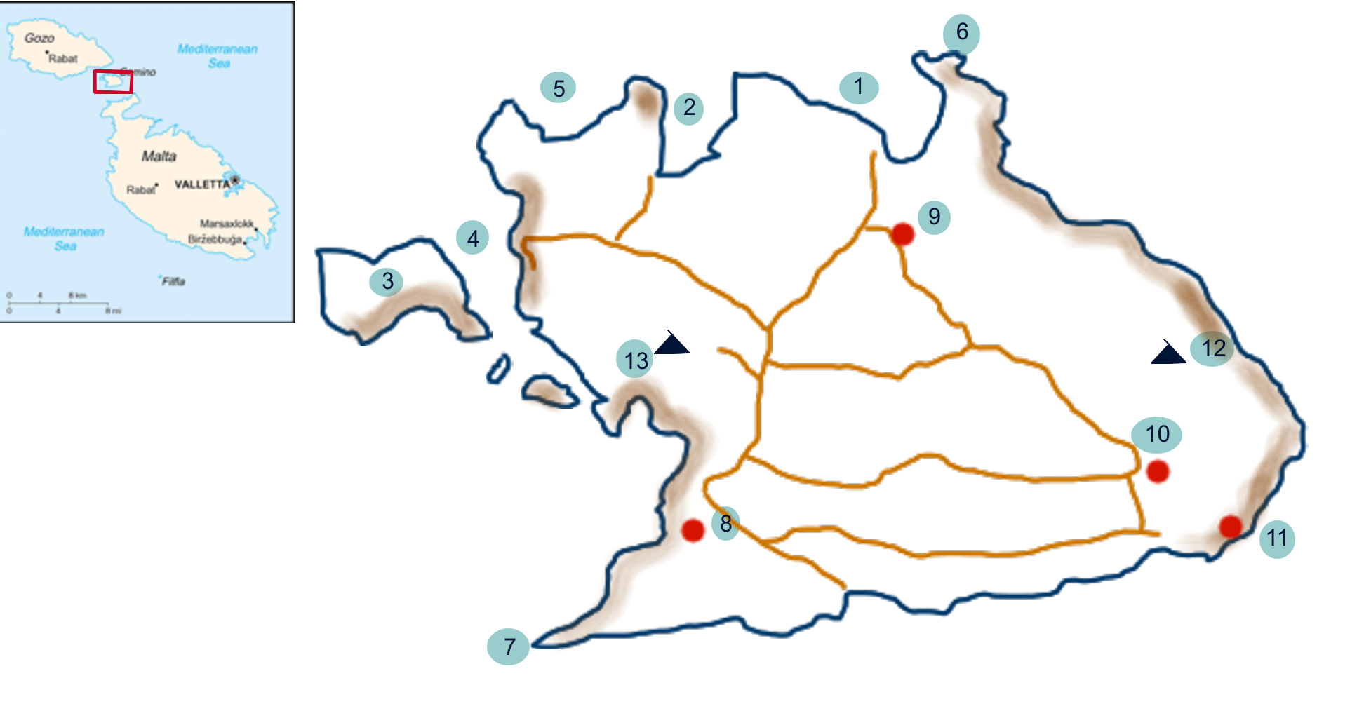 Plano esquematico de la isla de Comino, incluye plano de ubicacion Image:Mt-map.png de Commons ⋅